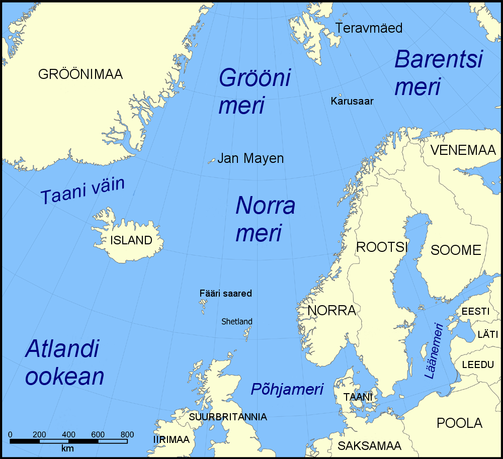 Norra mere kaart